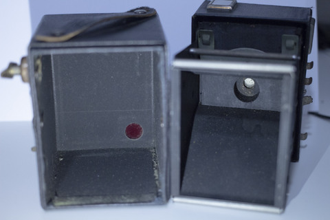 Interior cámara Goldy 6x9